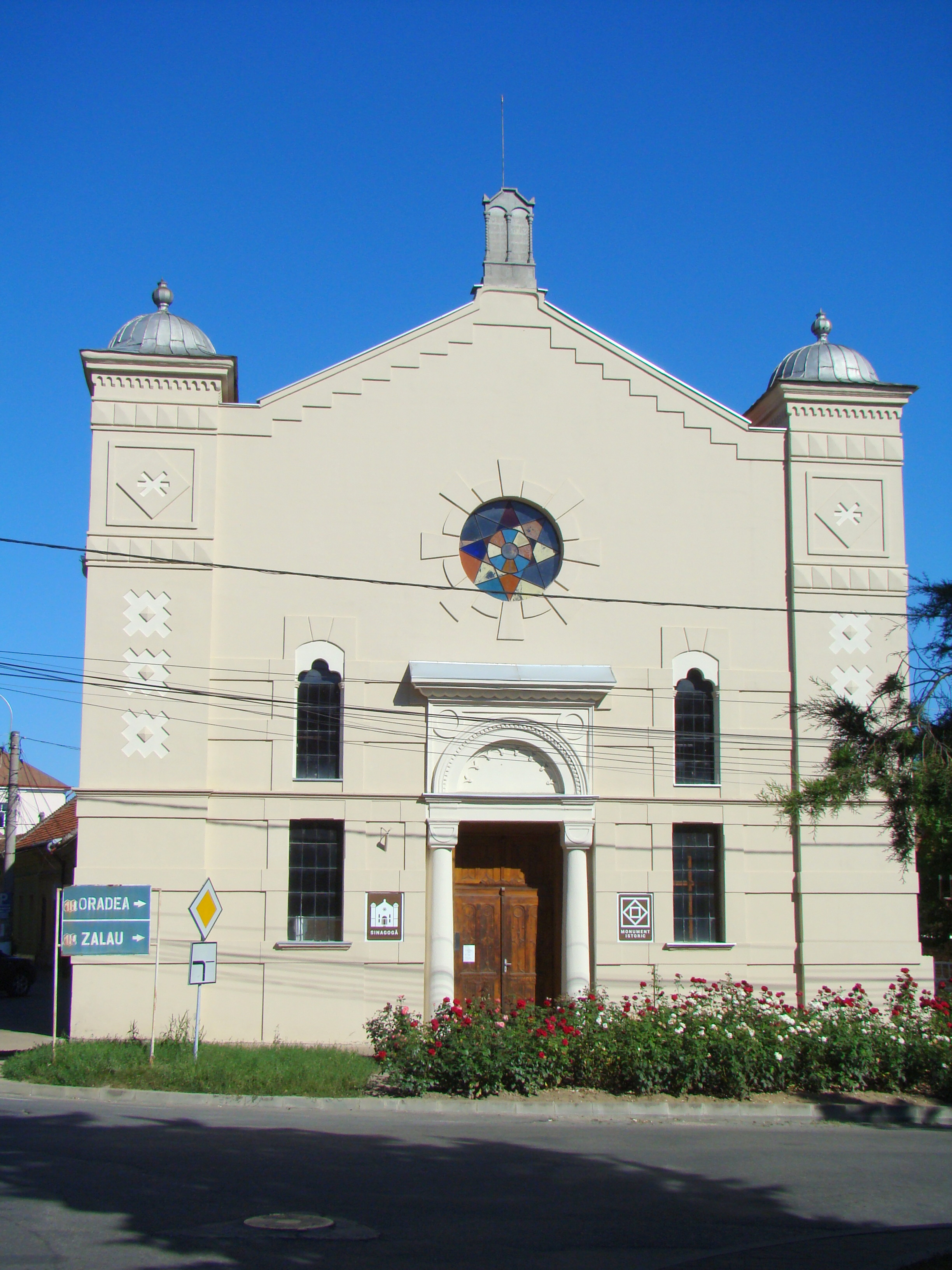 Sinagogă, oraș Șimleu Silvaniei, Piața 1 Mai 13